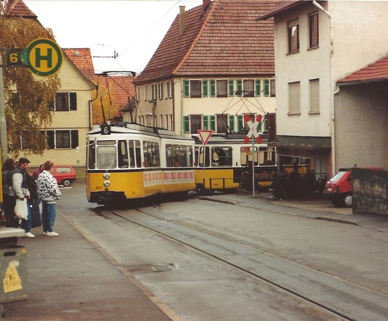 Echterdingen, 2. November 1990. Tw 507 mit Tw 543 biegt, von der Hauptstraße kommend, in die Hirschstraße ein.